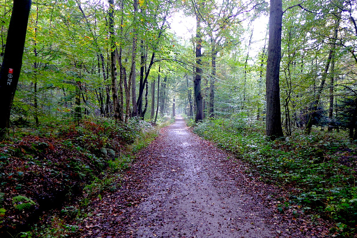 "Тропа Клинка" - туристский маркированнный маршрут вокруг немецкого города Золинген (Северный Рейн-Вестфалия). Седьмой этап: окрестностями Лангенфельда. 8.4 км.